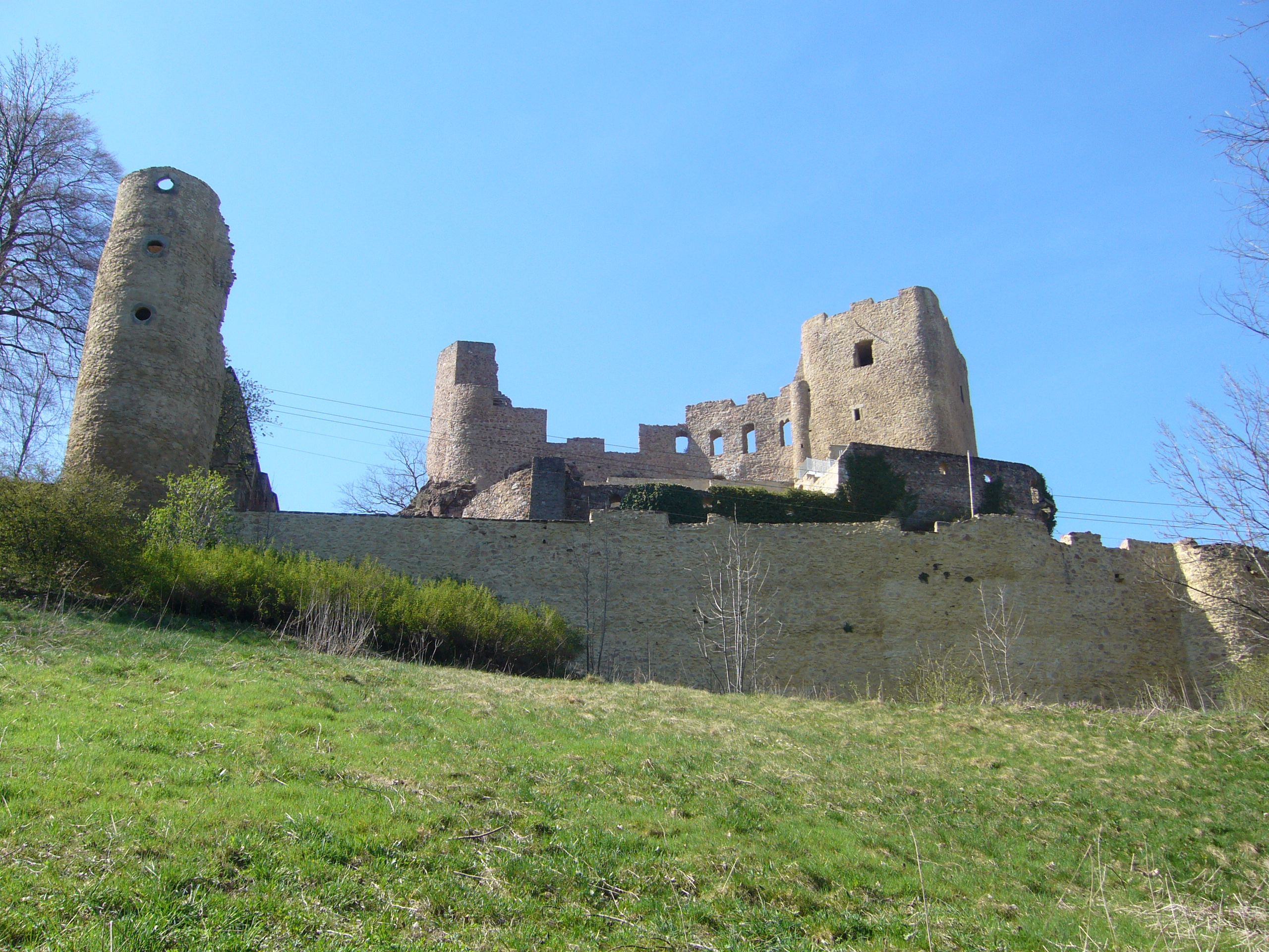 Burg Frauenstein in Sachsen